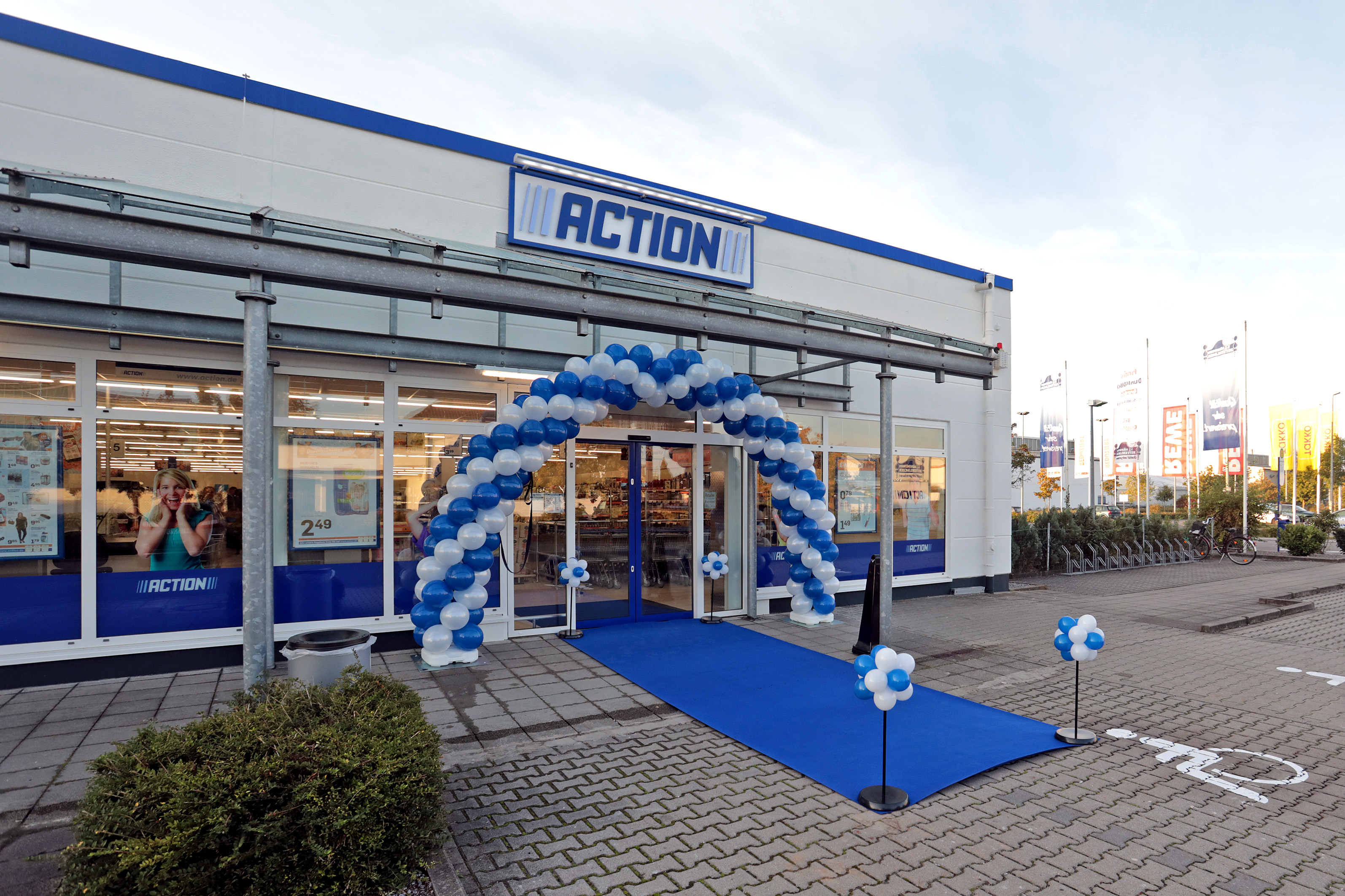 Eröffnung der 100sten Filiale in Deutschland, Lampertheim (2016)